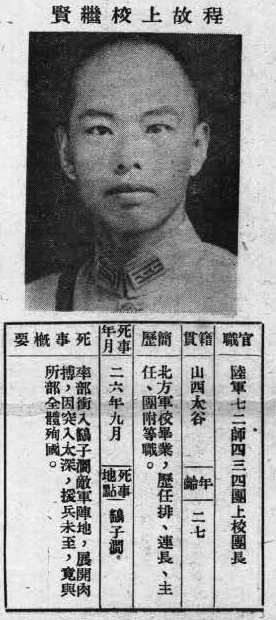 抗戰軍人忠烈錄第一輯中的烈士遺像